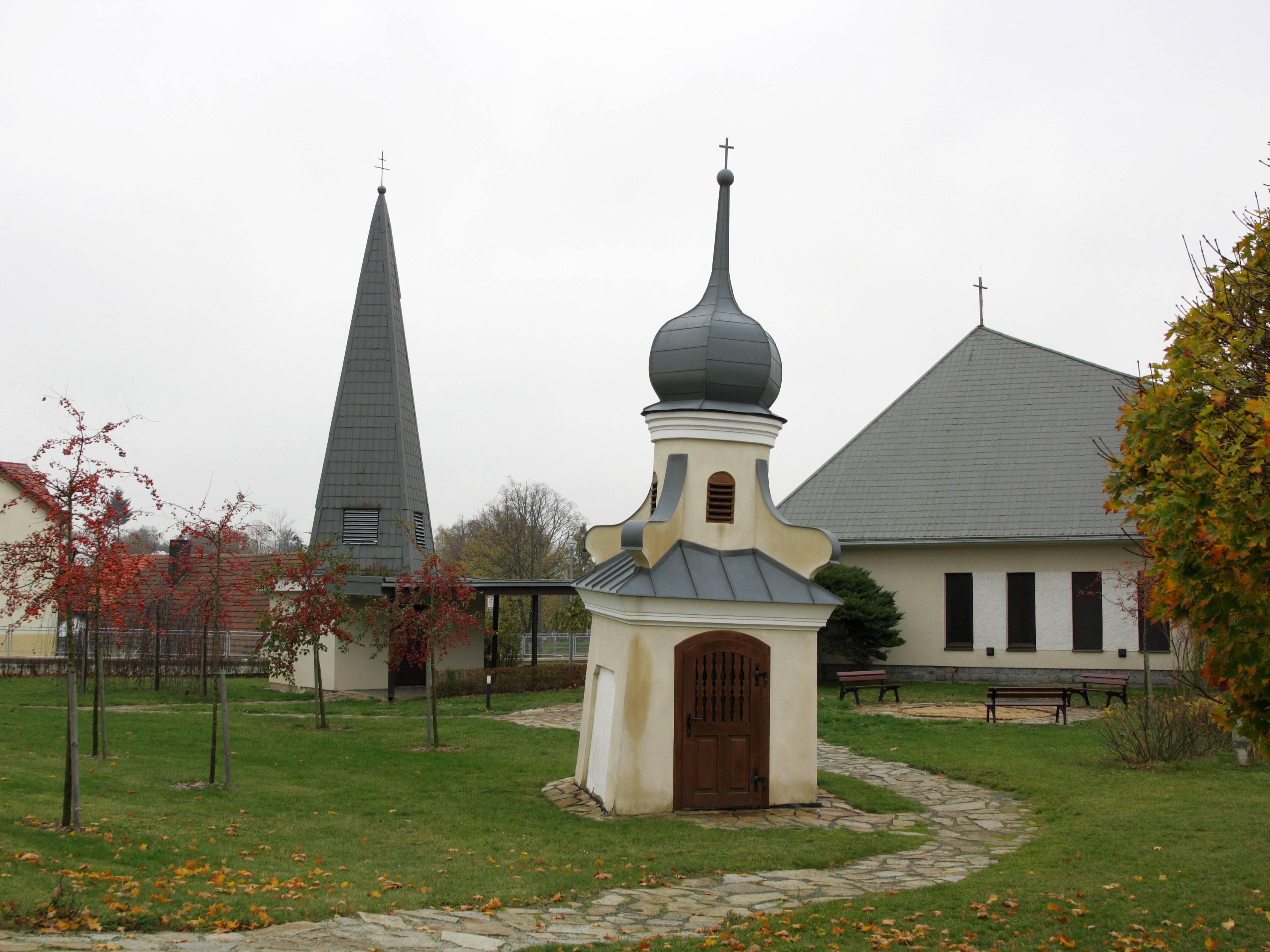 Blízkov - náves a kaple svatého Jana Nepomuckého